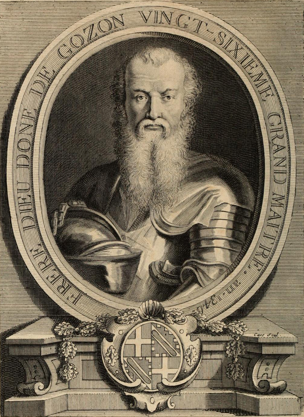 grand maître de l'ordre de Saint-Jean de Jérusalem